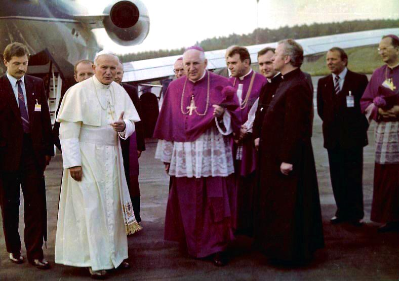 Papież Jan Paweł II w Gdyni 11 czerwca 1987, w trakcie III podróży apostolskiej do Polski. Tu: na lotnisku wojskowym w Gdyni Babich Dołach w oczekiwaniu na przyjazd kolumny samochodów.